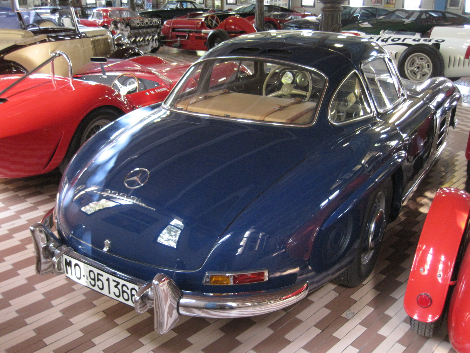 Automobiles in Panini Maserati Museum in Modène